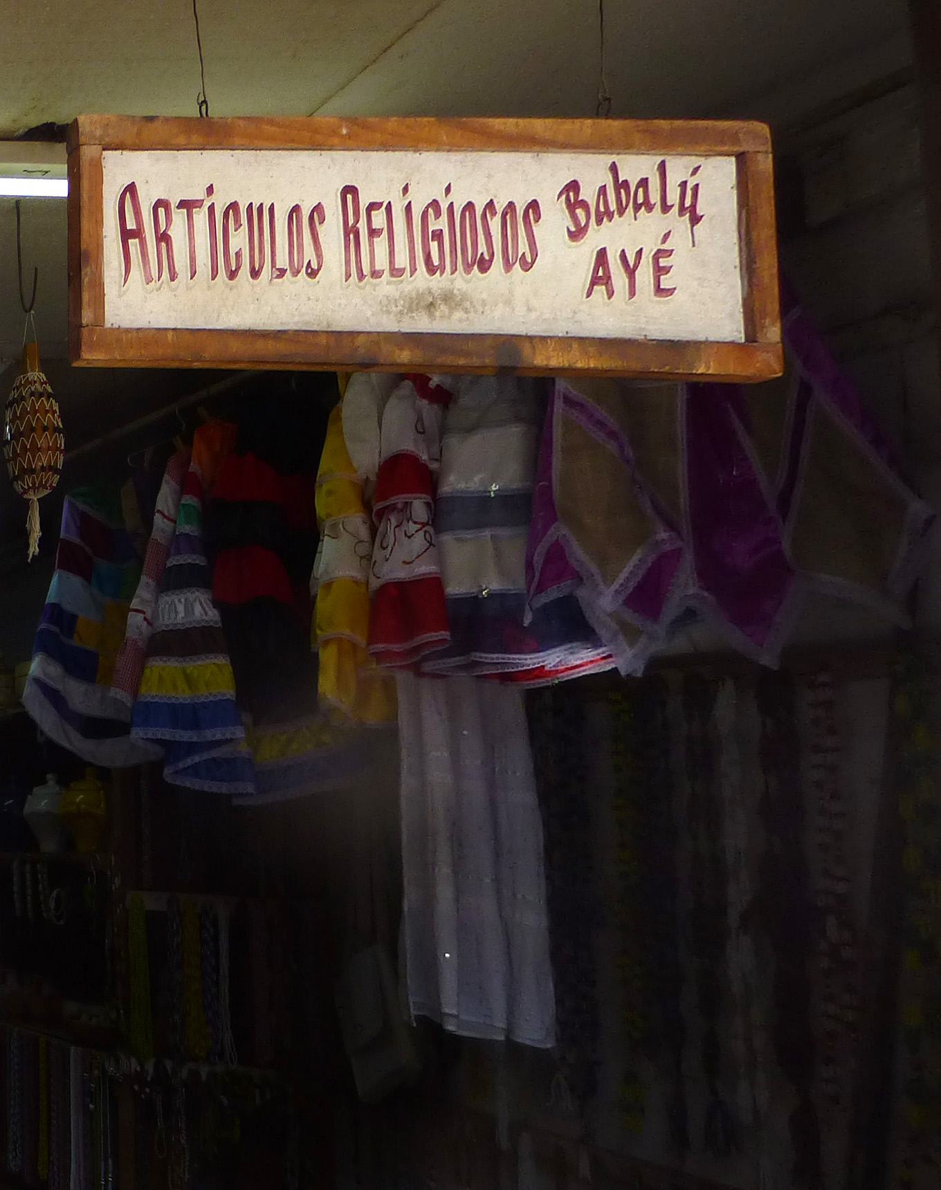 La Havane : vente d'articles religieux (Santería)